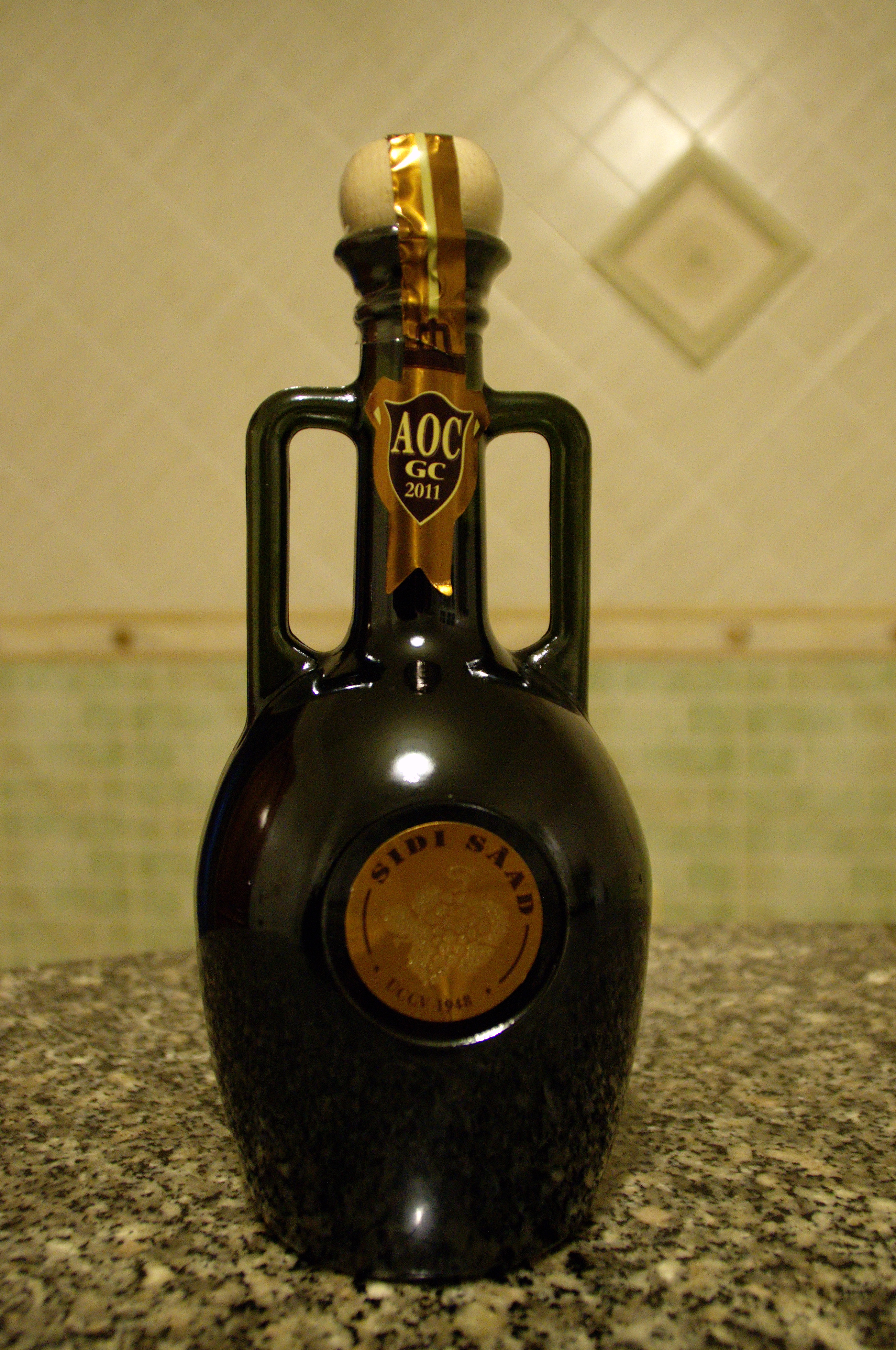 Bouteille de vin rouge, Sidi Saâd de Tunisie